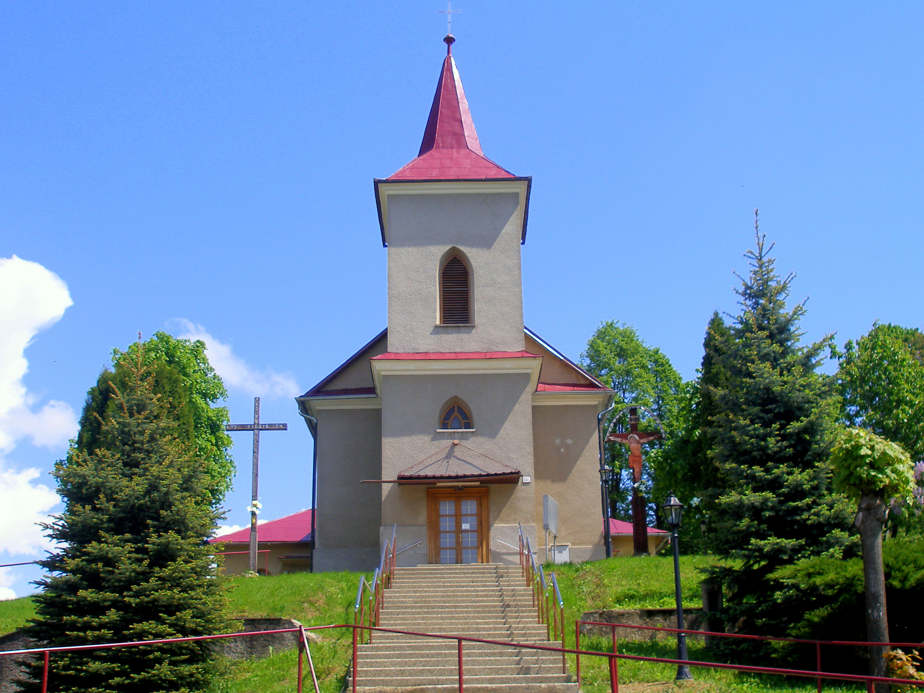 Sedlice Kostol Premenenia Pána, okres Prešov, región Šariš.